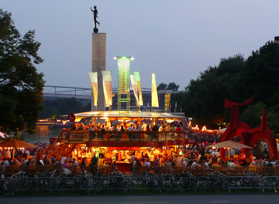 Maschseefest